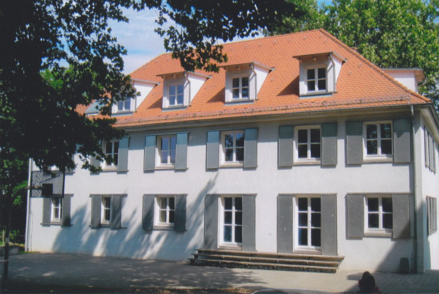 Von Oskar Bloch erstellter Erweiterungsbau mit zusätzlichen Zimmern und Betraum in der Wilhelmsruhe in Heilbronn-Sontheim Foto: Rolf Bohland